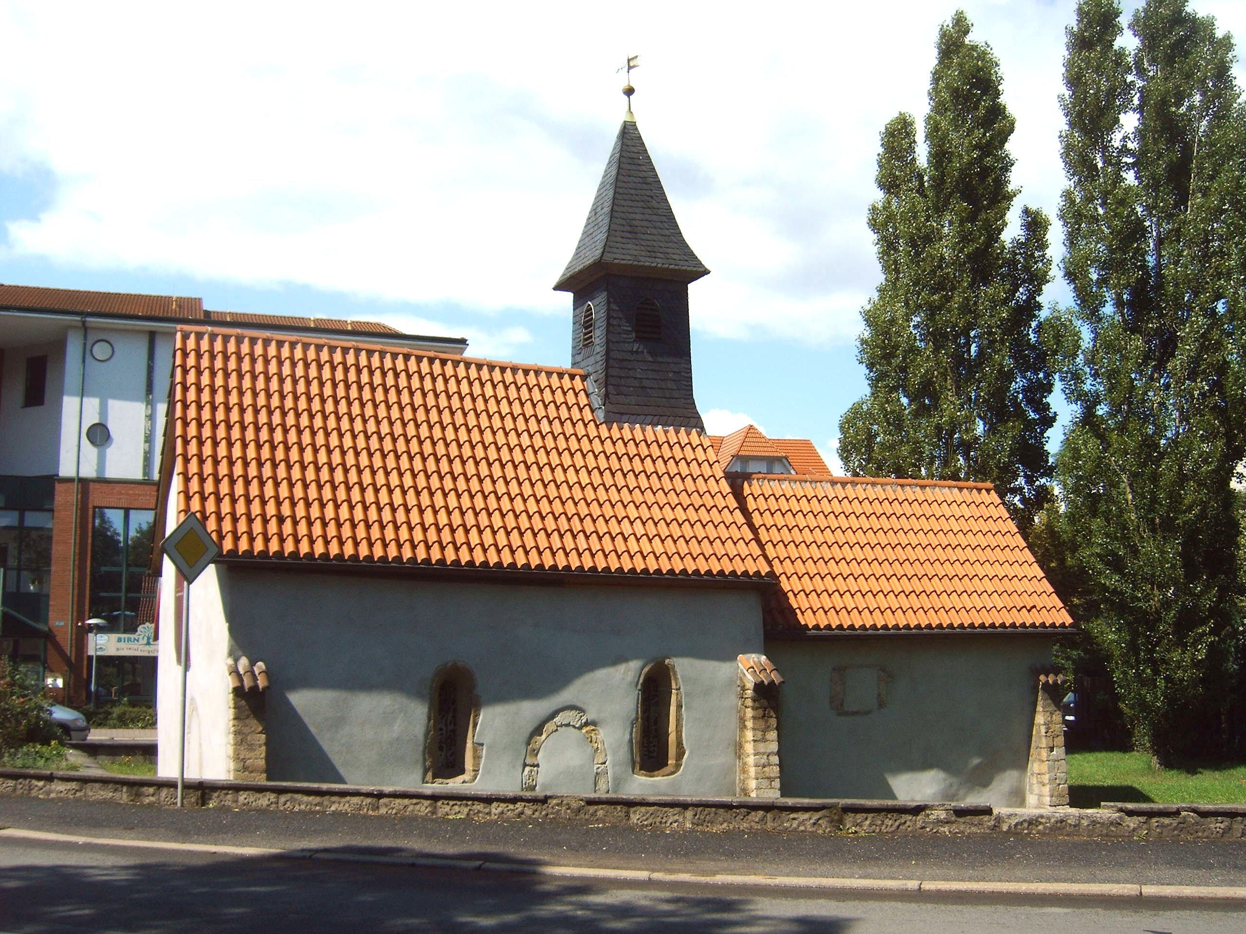 Clemenskapelle in Eisenach, Thüringen